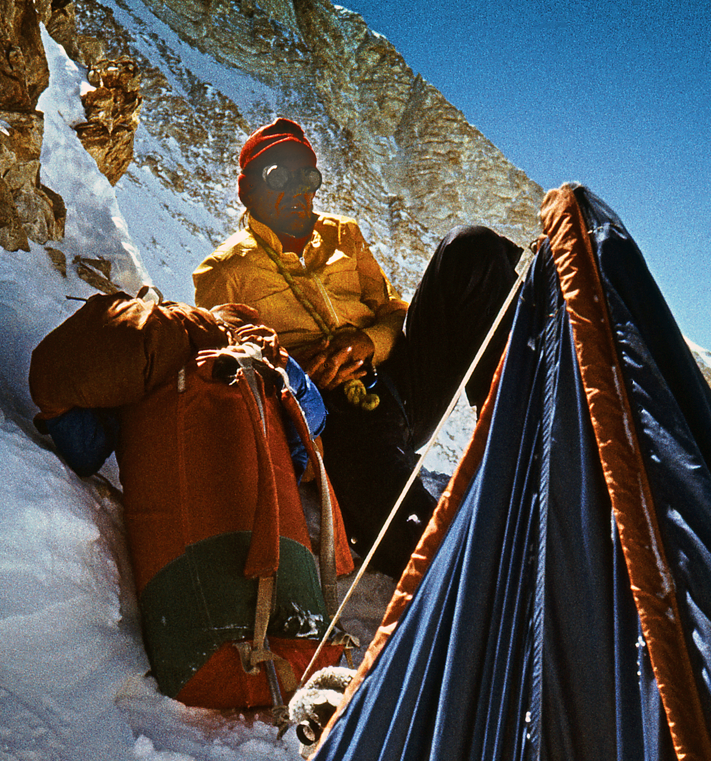 Läti alpinist Pēteris Kūlis.